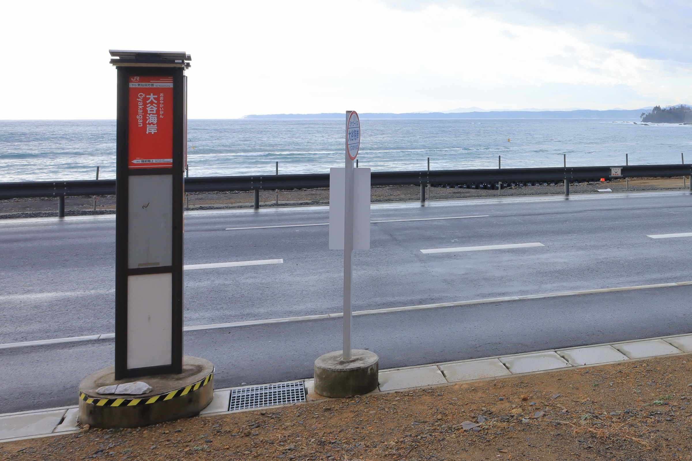 宮城県気仙沼市に所在する、JR東日本・気仙沼線BRTの大谷海岸駅。2019年12月の状況。